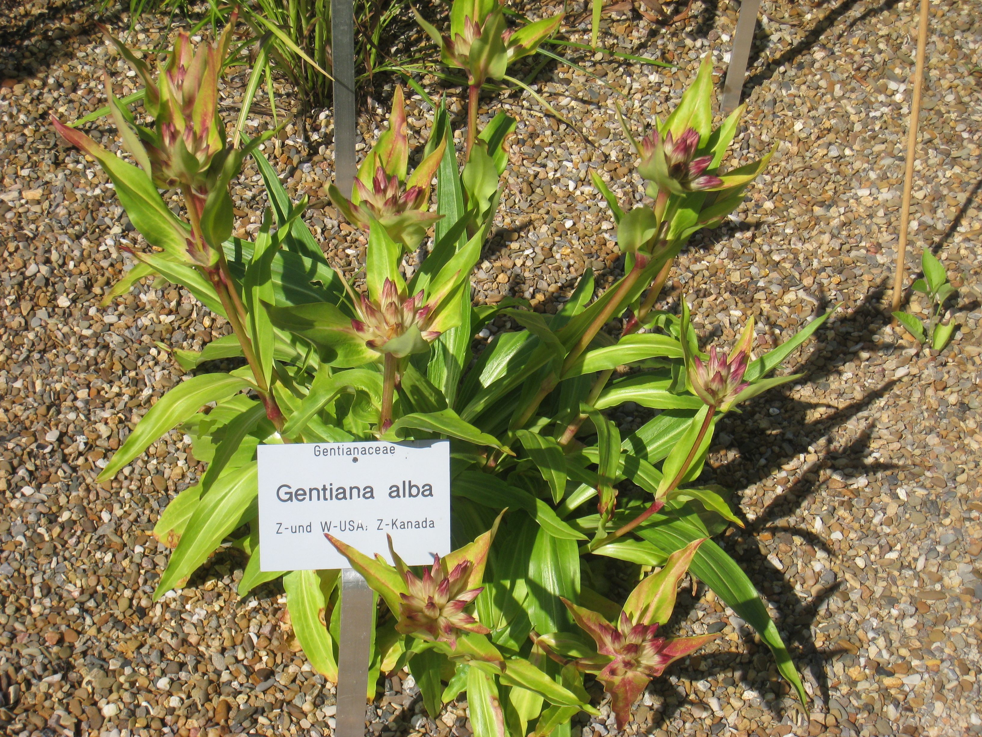 Gentiana alba in the Botanischer Garten der Universität Würzburg, Würzburg, Germany.